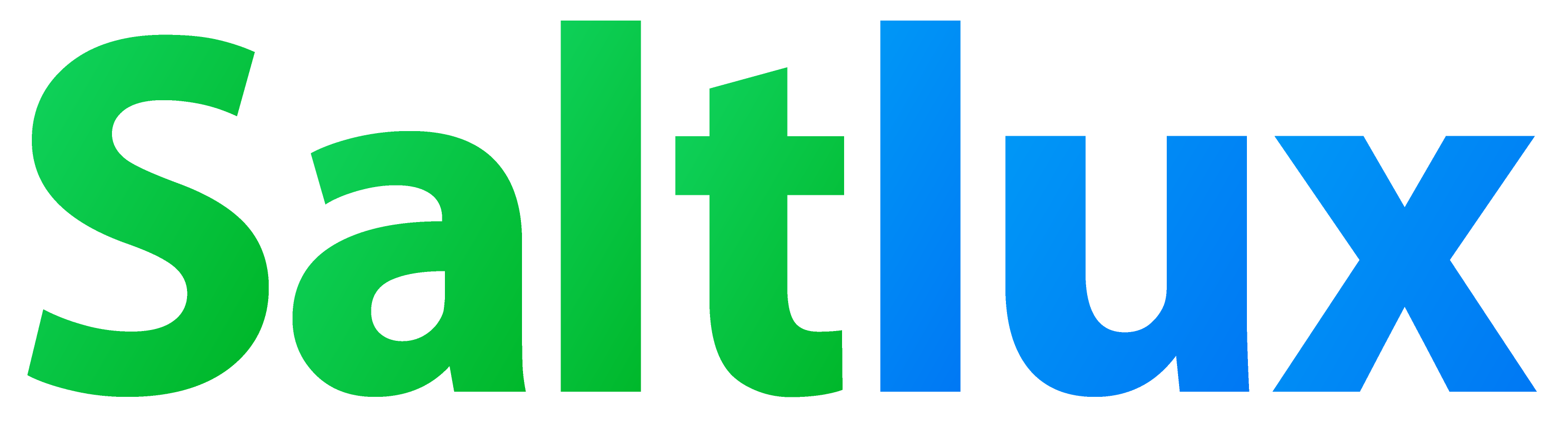 솔트룩스(SALTLUX)는 ‘SALT(소금)’와 ‘LUX(빛)’의 합성어로서, 새로운 지식기반 세상에 필요한 빛과 소금의 역할을 담당할 기업 철학을 내포하고 있습니다. 구체적으로 ‘SALT’는 변치 않는 도덕적 가치와 성실한 봉사의 정신 그리고 통화와 자본으로서 가장 오래된 화폐 기능 등 문화적 이미지를 상징합니다. 또한 ‘LUX’는 빠르게 변하는 지식과 정보를 손쉽게 제공하는 IT 기술로서의 빛과 따뜻하고 풍요롭게 변화하는 미래의 문명적 이미지를 상징하고 있습니다. 따라서 ‘SALT’는 기업의 내재 가치를, ‘LUX’는 기업이 제공하는 기술적 서비스를 뜻합니다.